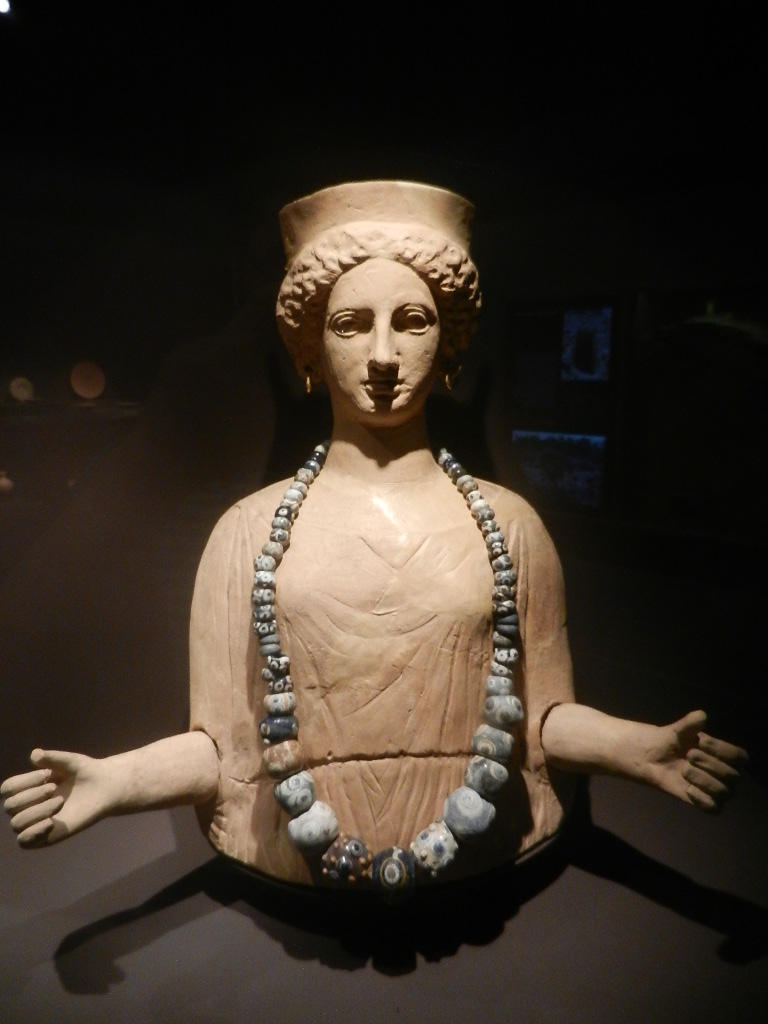 Estatua del Museo de Arqueología de Cataluña en Barcelona.